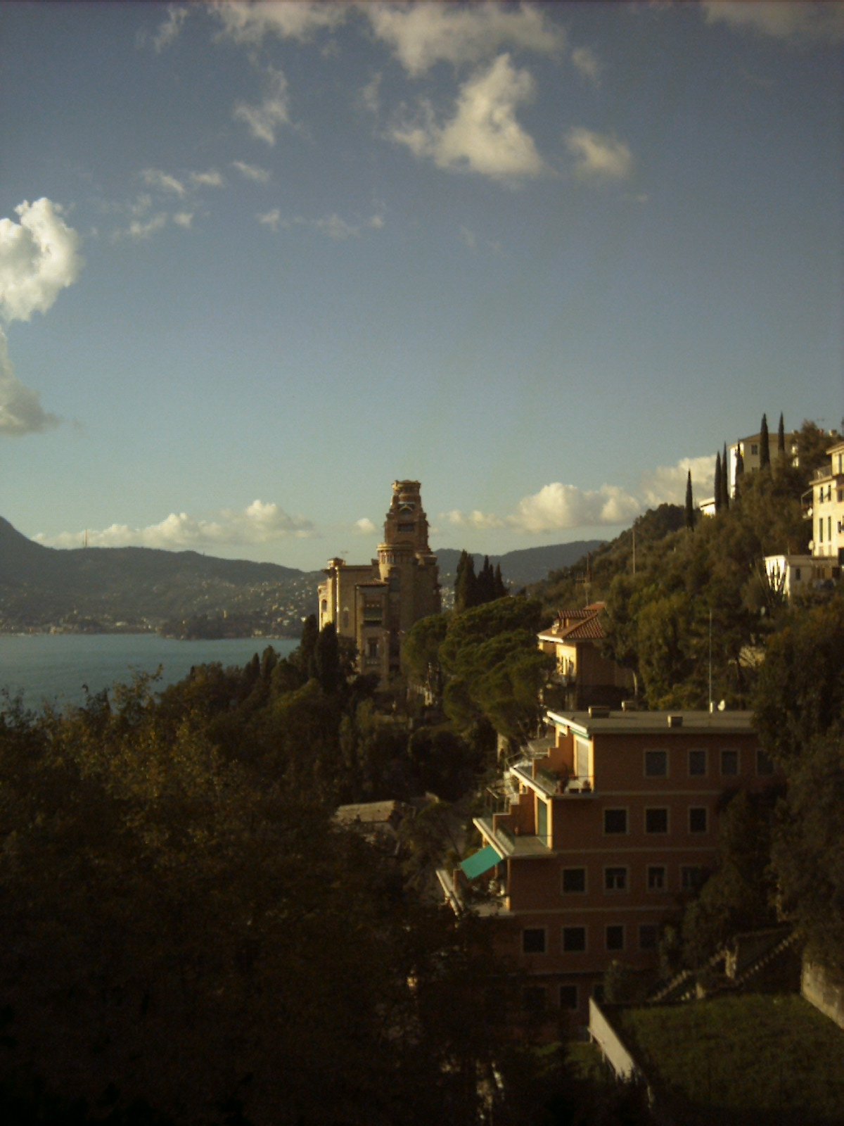 Castello di Sem Benelli di Zoagli